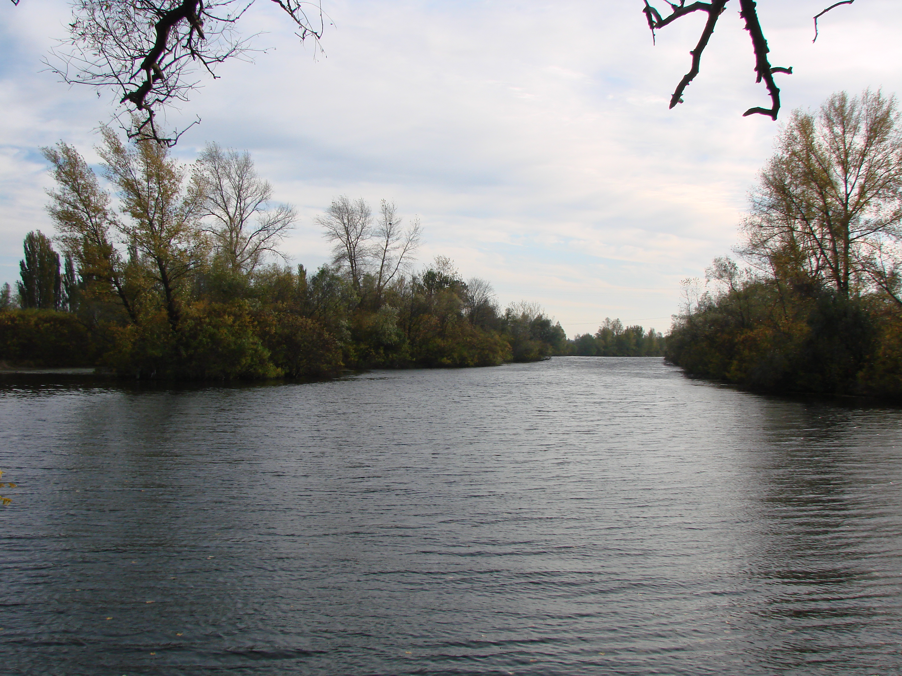 протока Десенка: Протока, що омиває Труханів острів зі сходу в Києві